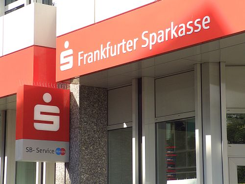 Leuchtreklame der Frankfurter Sparkasse an der Filiale in Frankfurt-Bornheim. Selbst fotografiert am 20. September 2006.